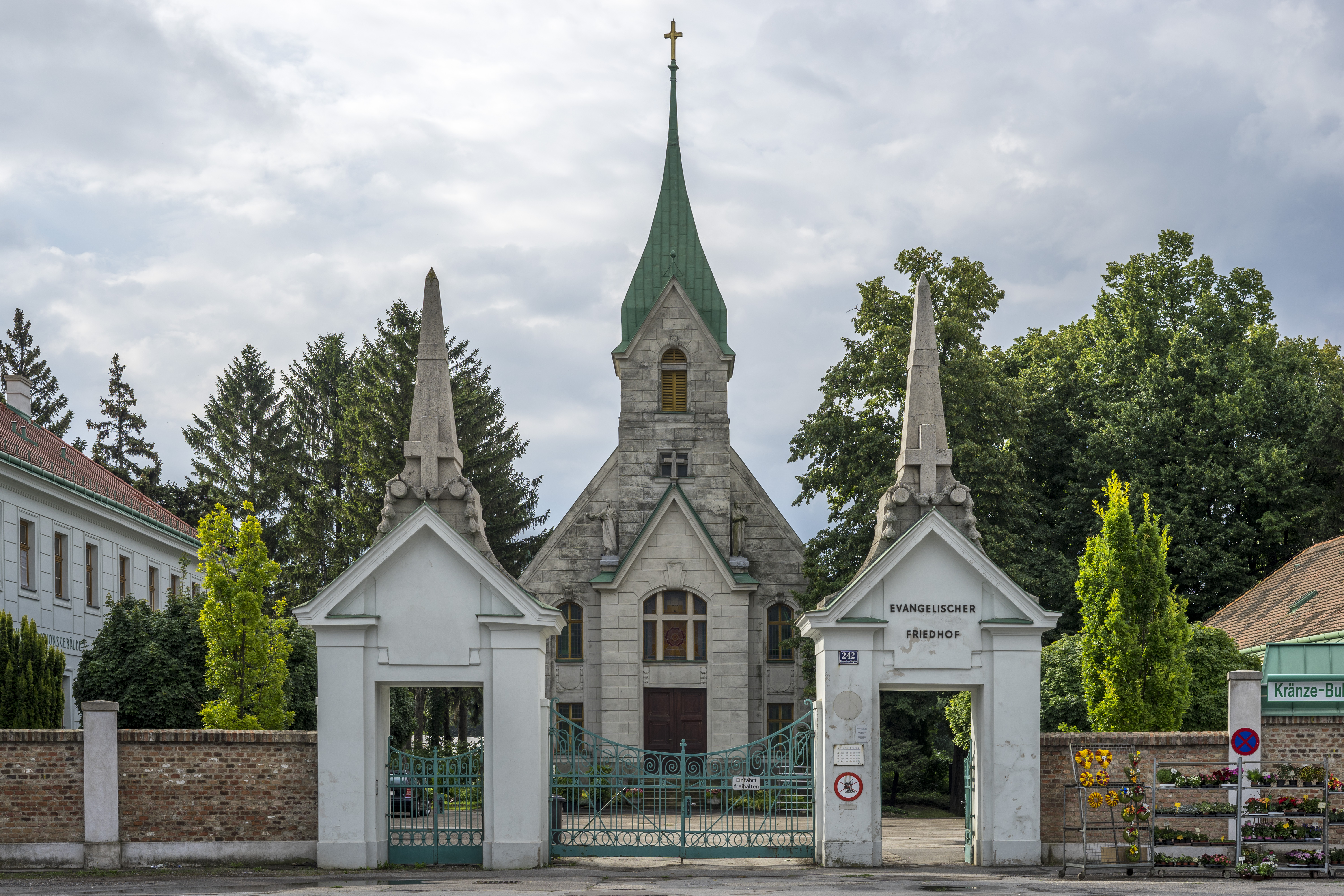 Zentralfriedhof Wien, Evangelische Kirche 1